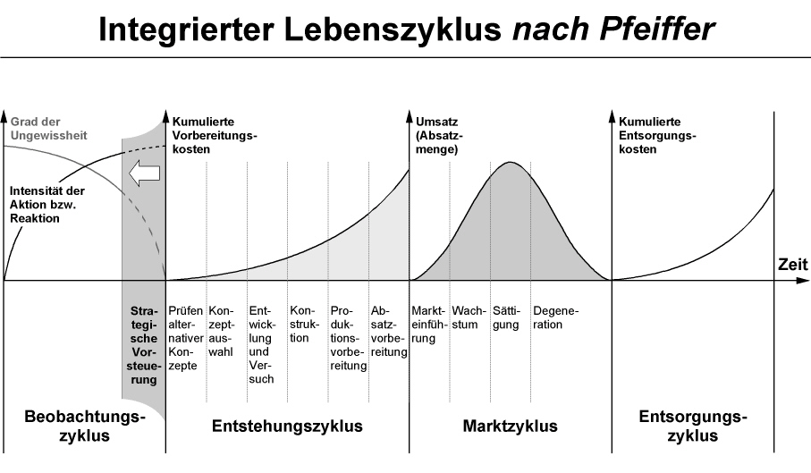 Integrierter Lebenszyklus nach Werner Pfeiffer, Beobachtungszyklus, Enstehungszyklus, Marktzyklus, Entsorgungszyklus